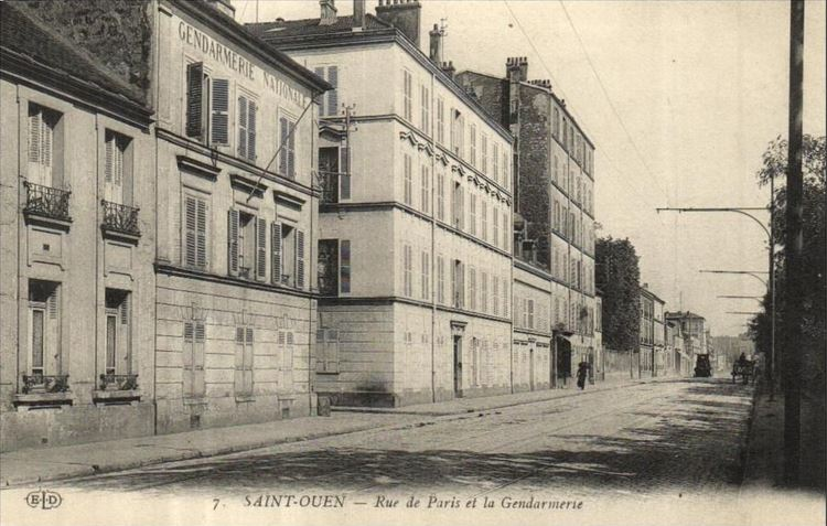 Saint-Ouen: La gendarmerie sur l'ancienne rue de Paris, aujourd'hui rue Albert-Dhalenne